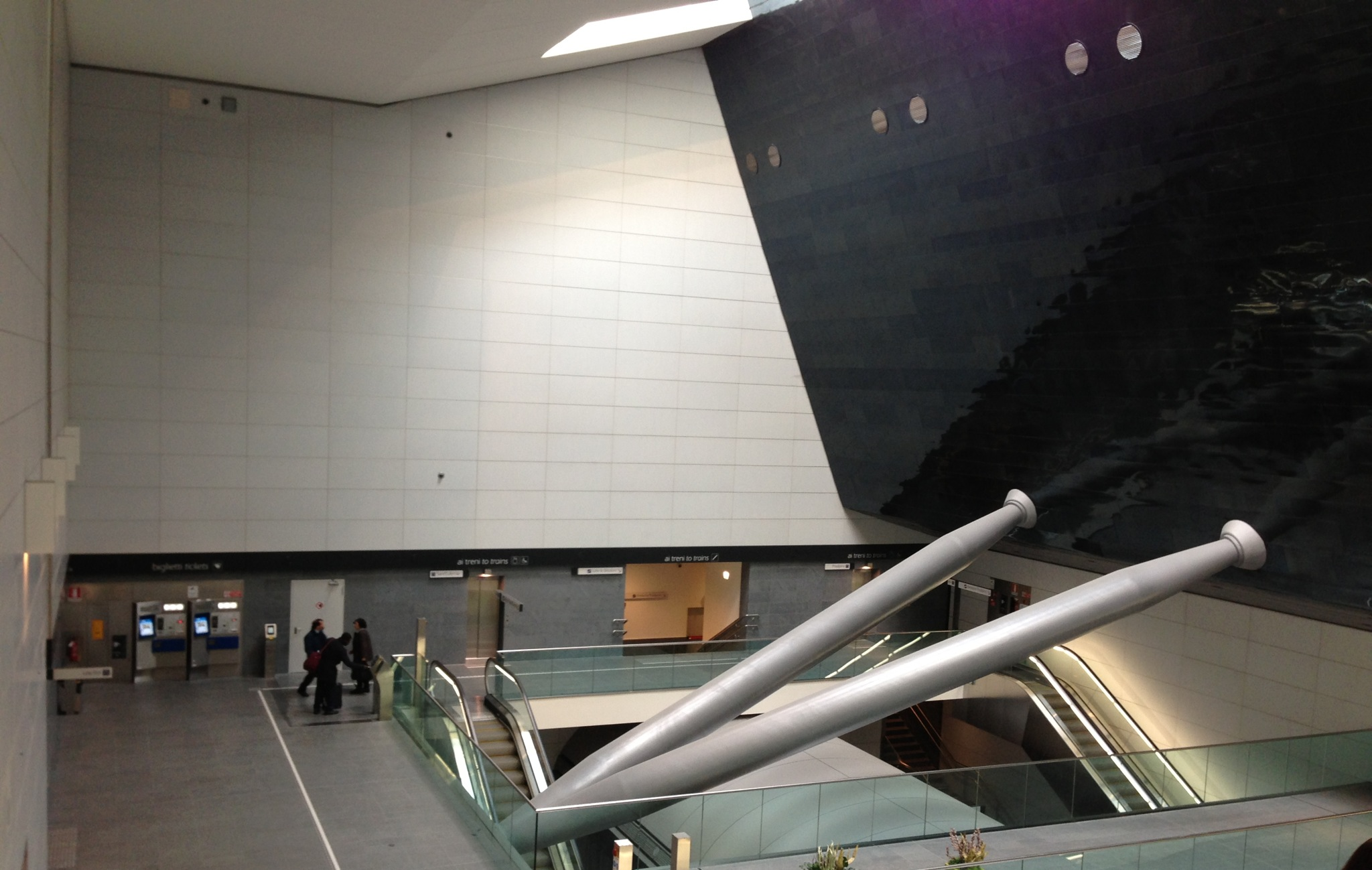 fermata stazione